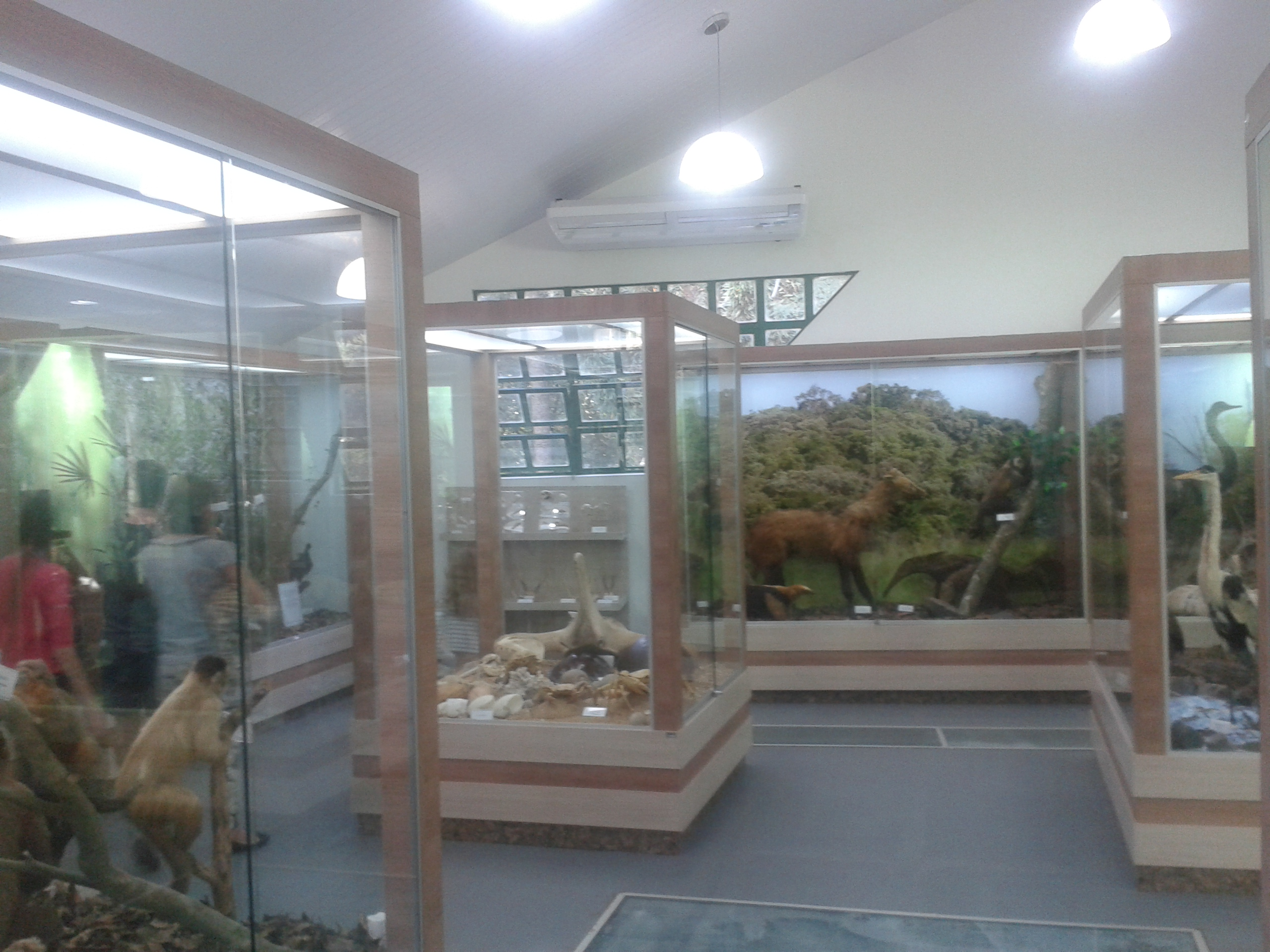 Museu de História Natural do Zoológico de Cascavel